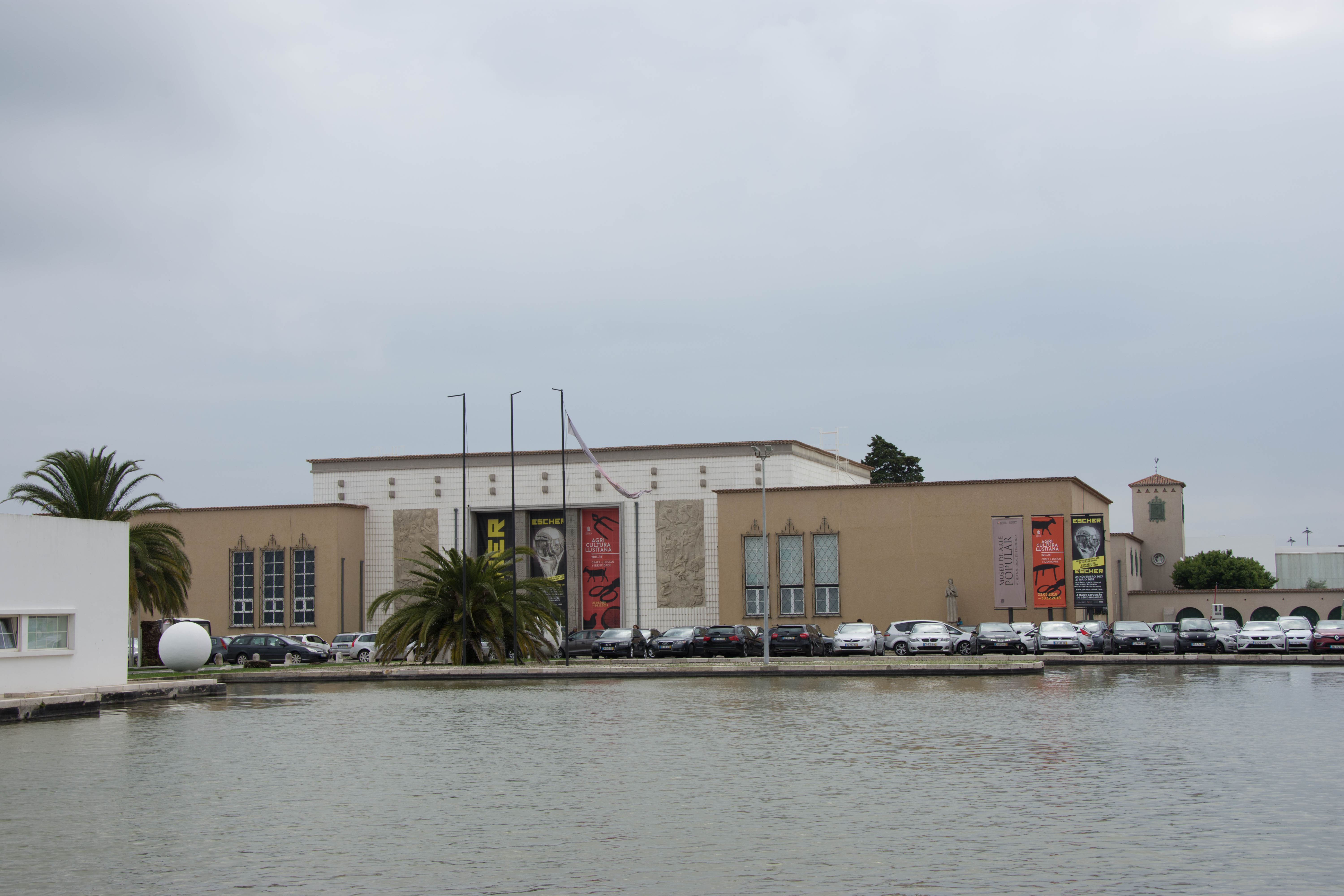 Lisbon-7707